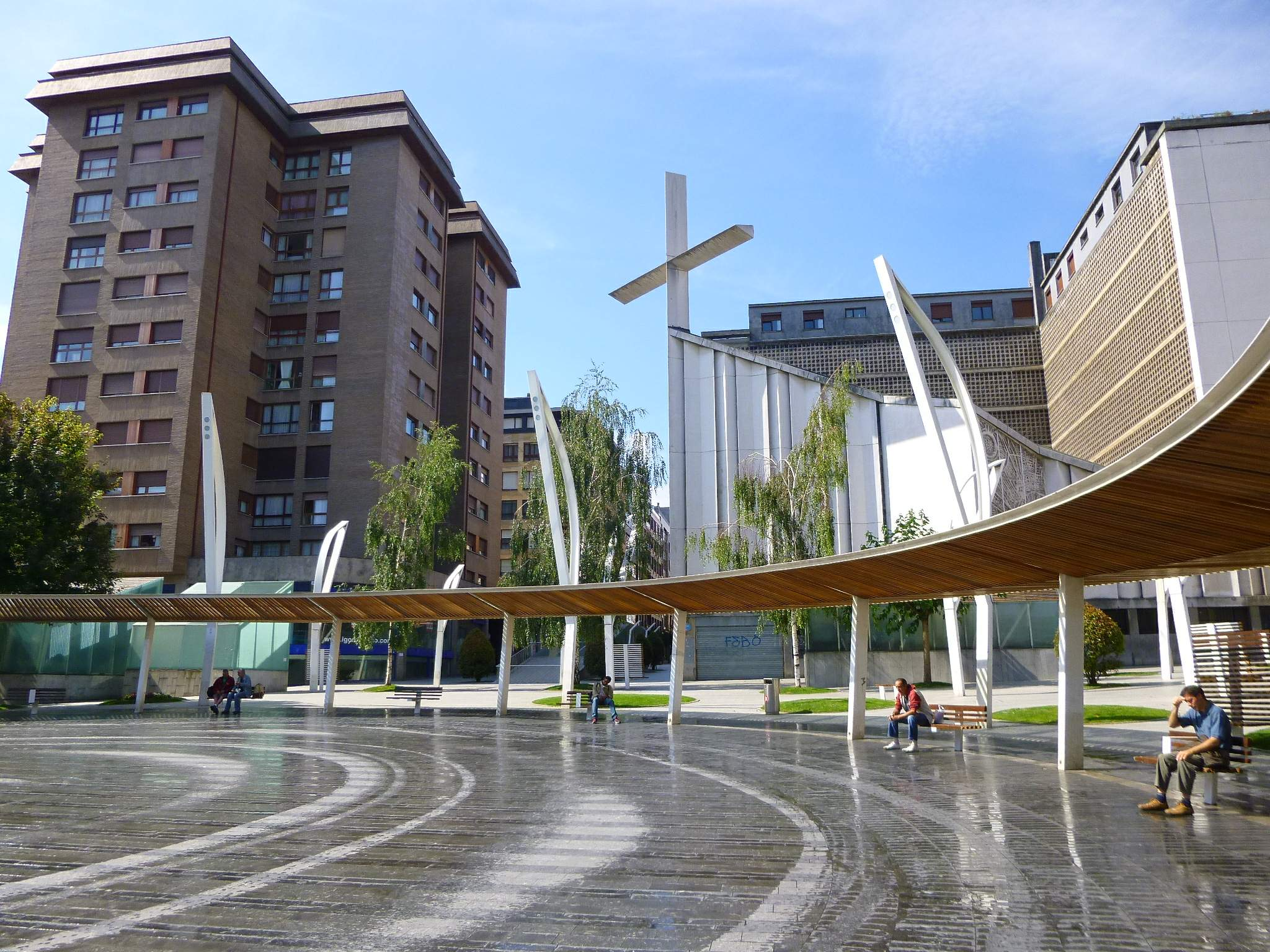 Plaza de Indautxu (Bilbao)